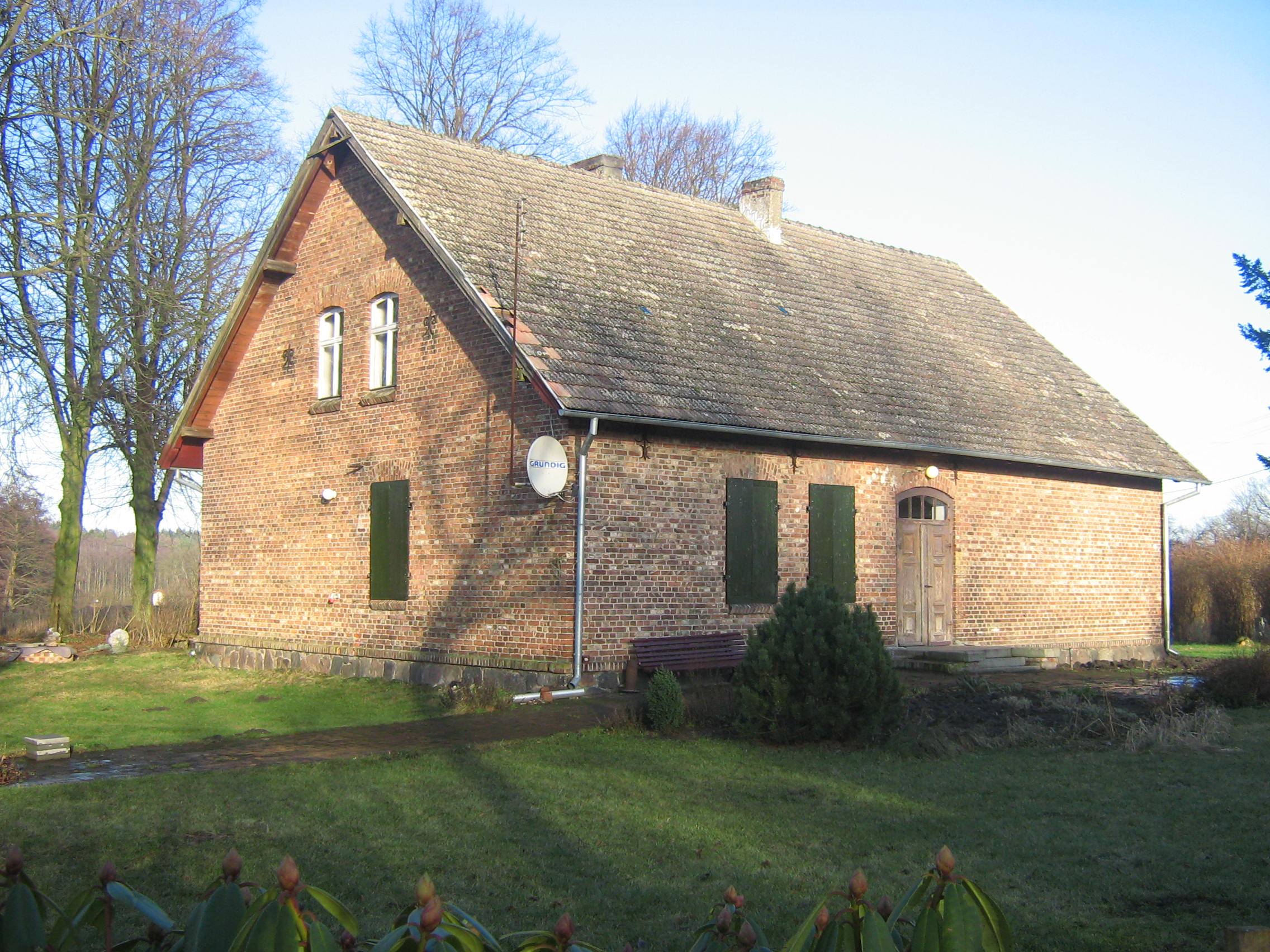 Dawna szkoła w Warnowie